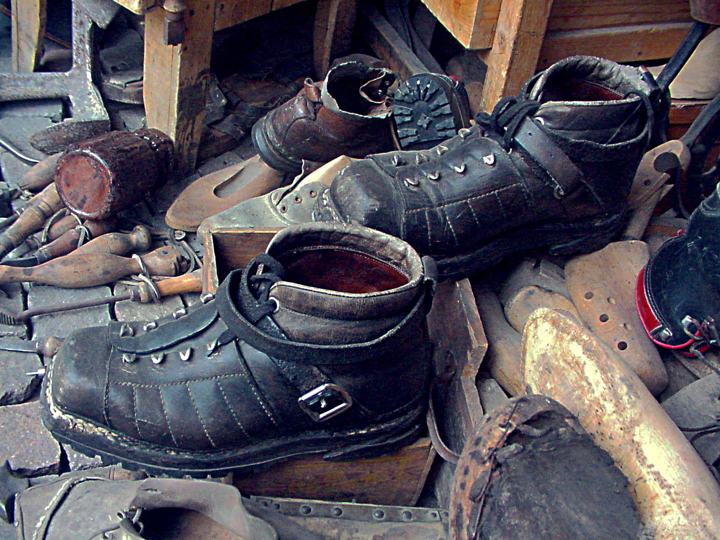 Vecchio scarpone priam meta' secolo XX